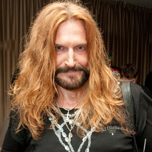 На презентации нового клипа Анны Семенович 6 июля 2011 года